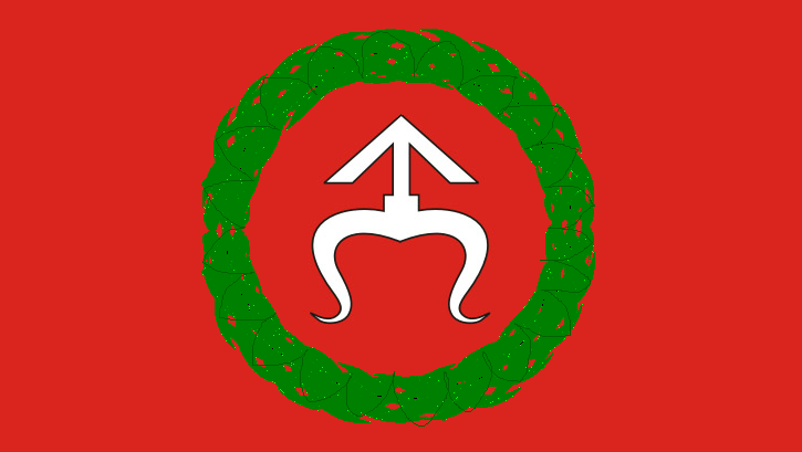 Chorągiwe